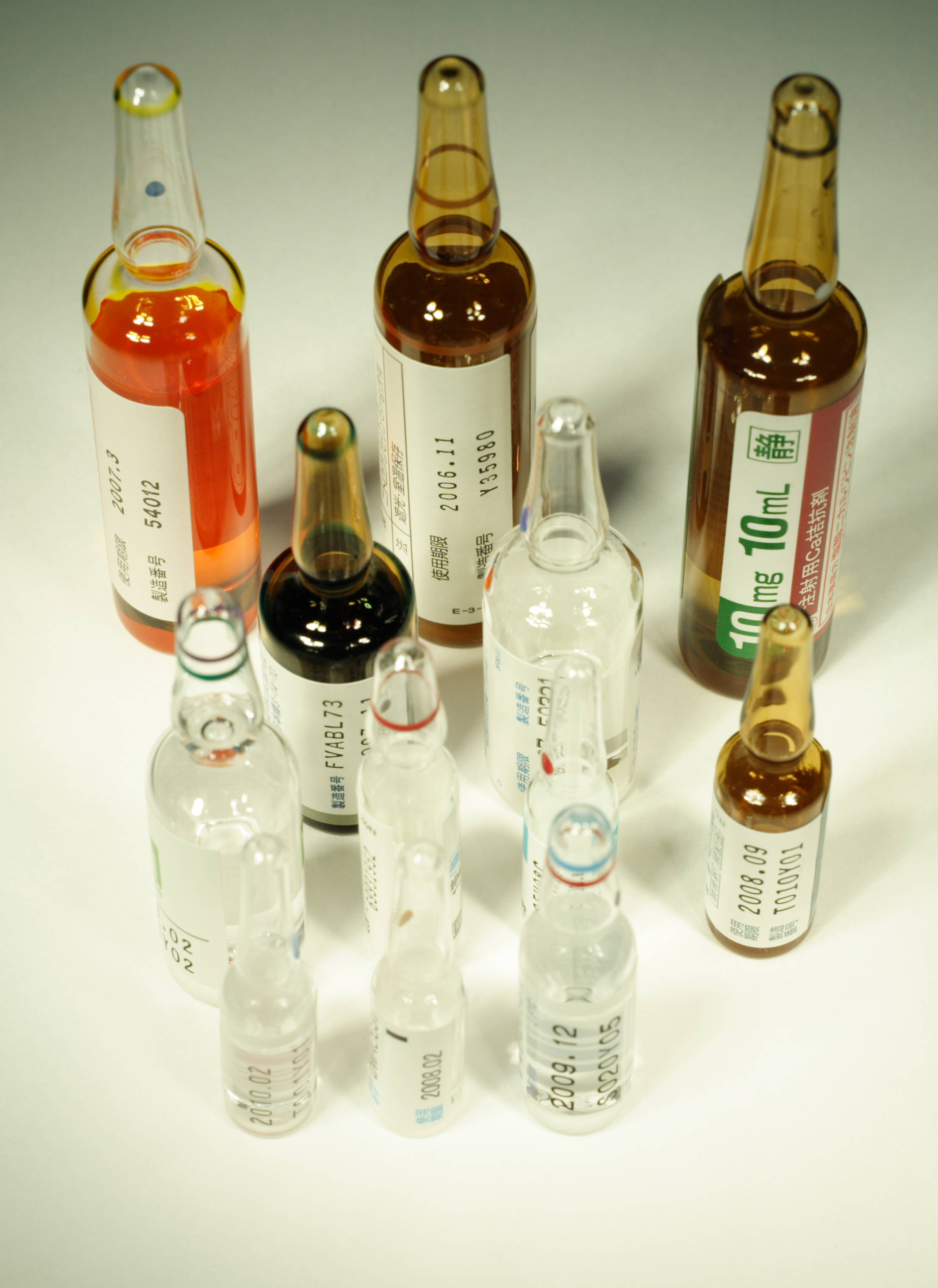 drug ampoule